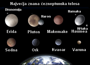 Opis: Na sliki so prikazana največja čezneptunska telesa. Avtor: Lexicon na angleški Wikipediji, slovenjenje: Nusha Vir: slika naložena v Zbirki. Originalna opisna stran je tu.